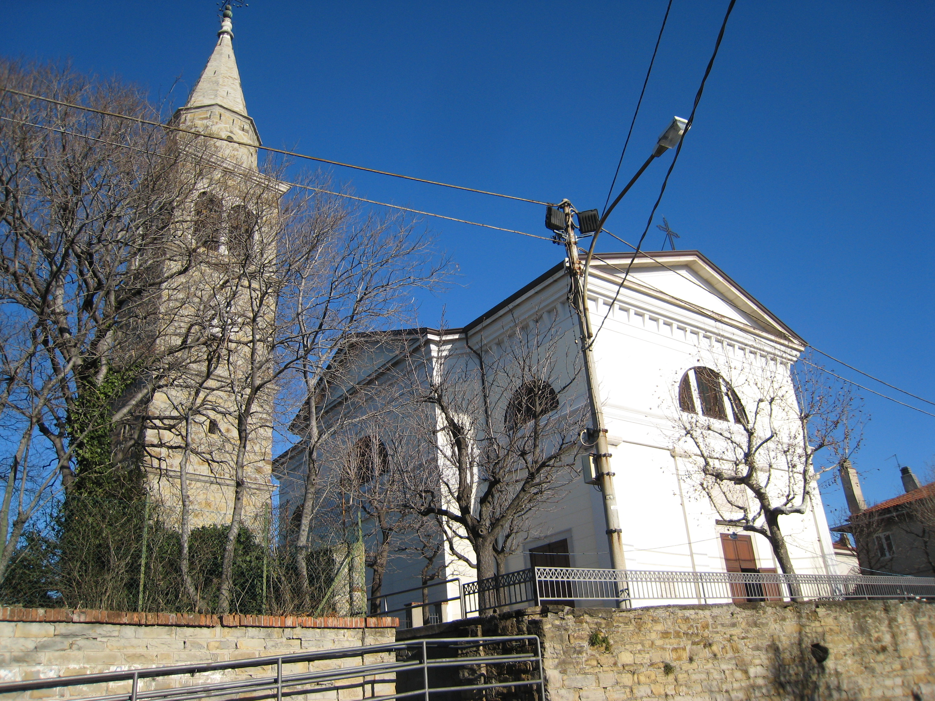 La chiesa di Servola (TS)